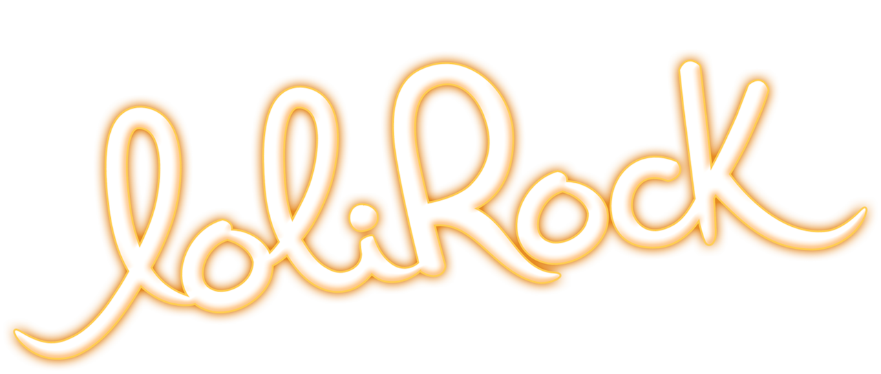 C'est le logo officiel de la série LoliRock